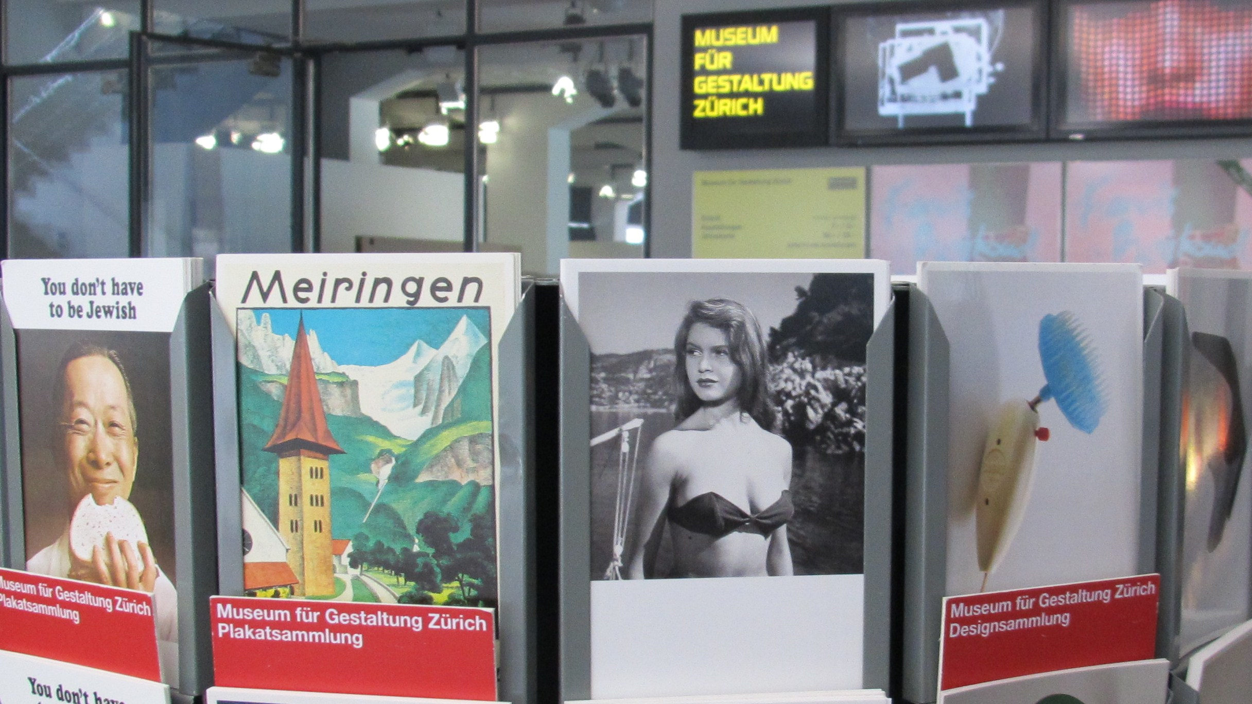 Zürich, Hochschule für Gestaltung und Kunst sowie Museum. Zürcher Hochschule der Künste (ZHdK), Ausstellungsstrasse 60